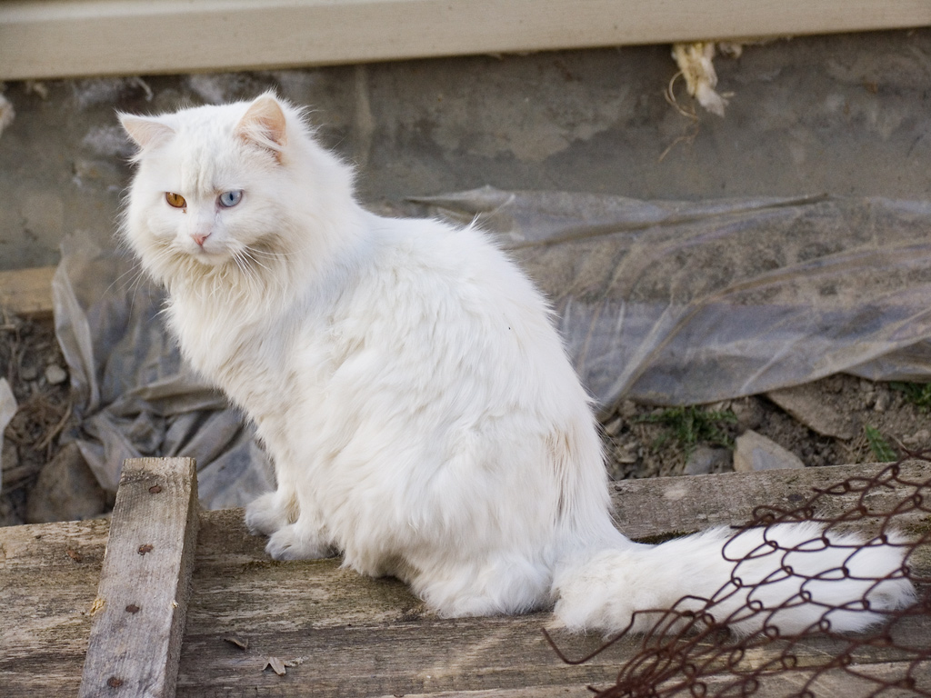 Weiße Katzen sind meist leuzistisch.